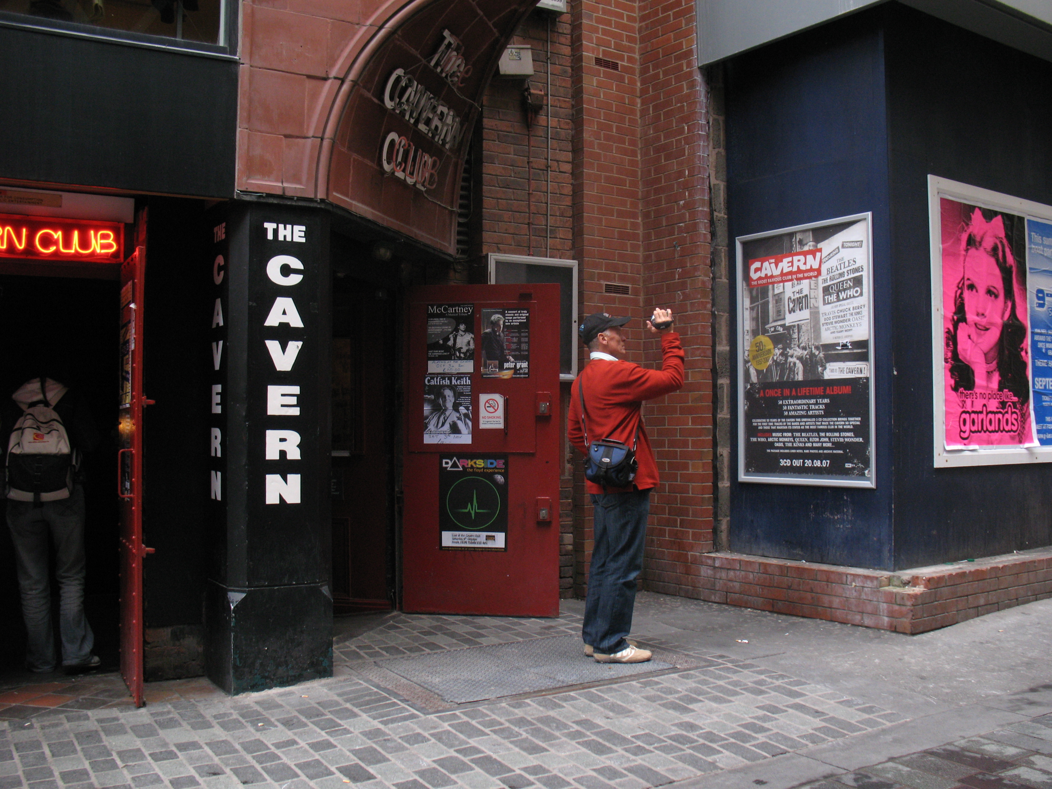 Ливърпул_9072